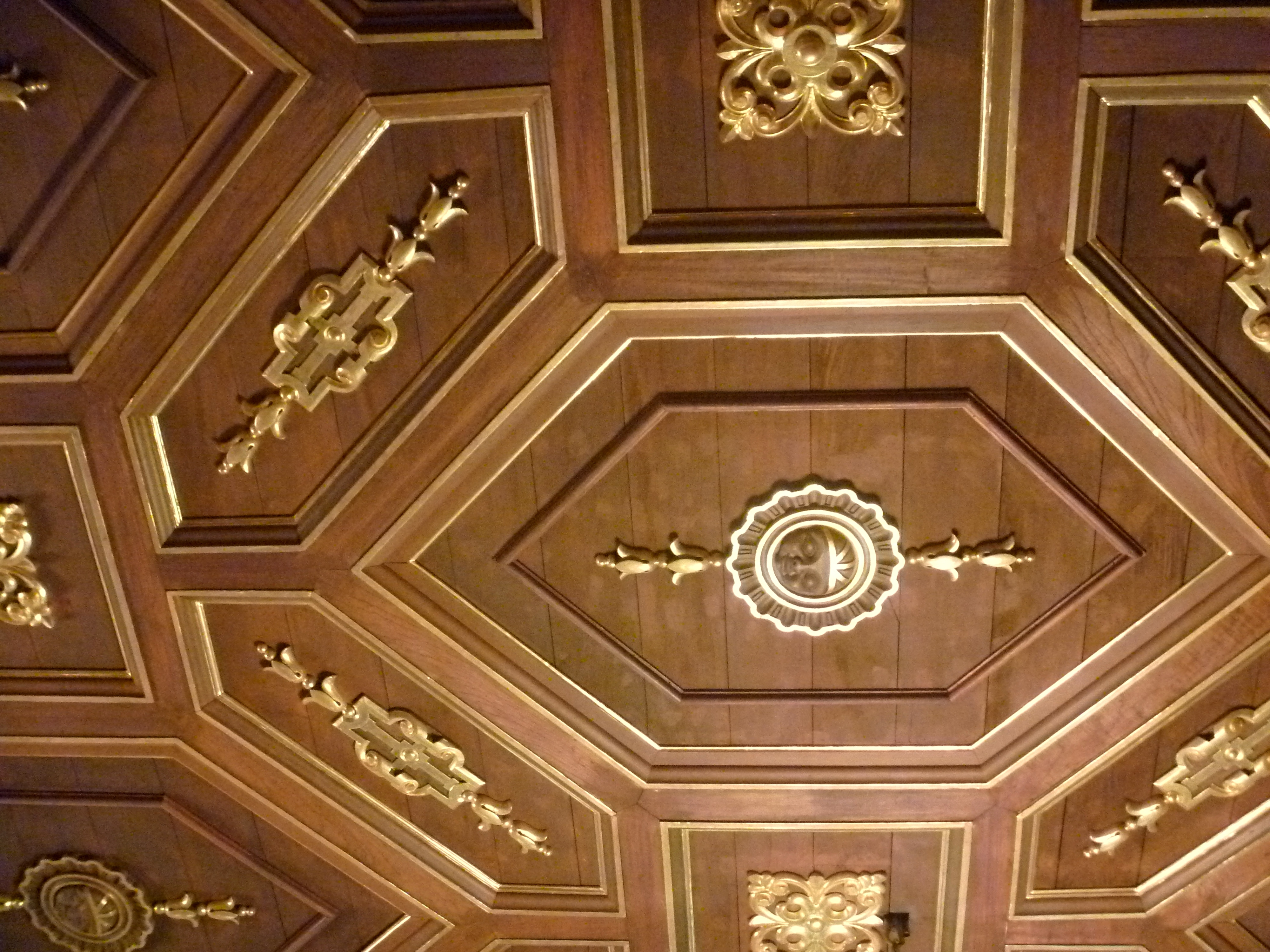 Detalle del artesonado del techo del Salón Amarillo, también conocido como de Los Presidentes. Palacio de Carondelet, Quito DM.